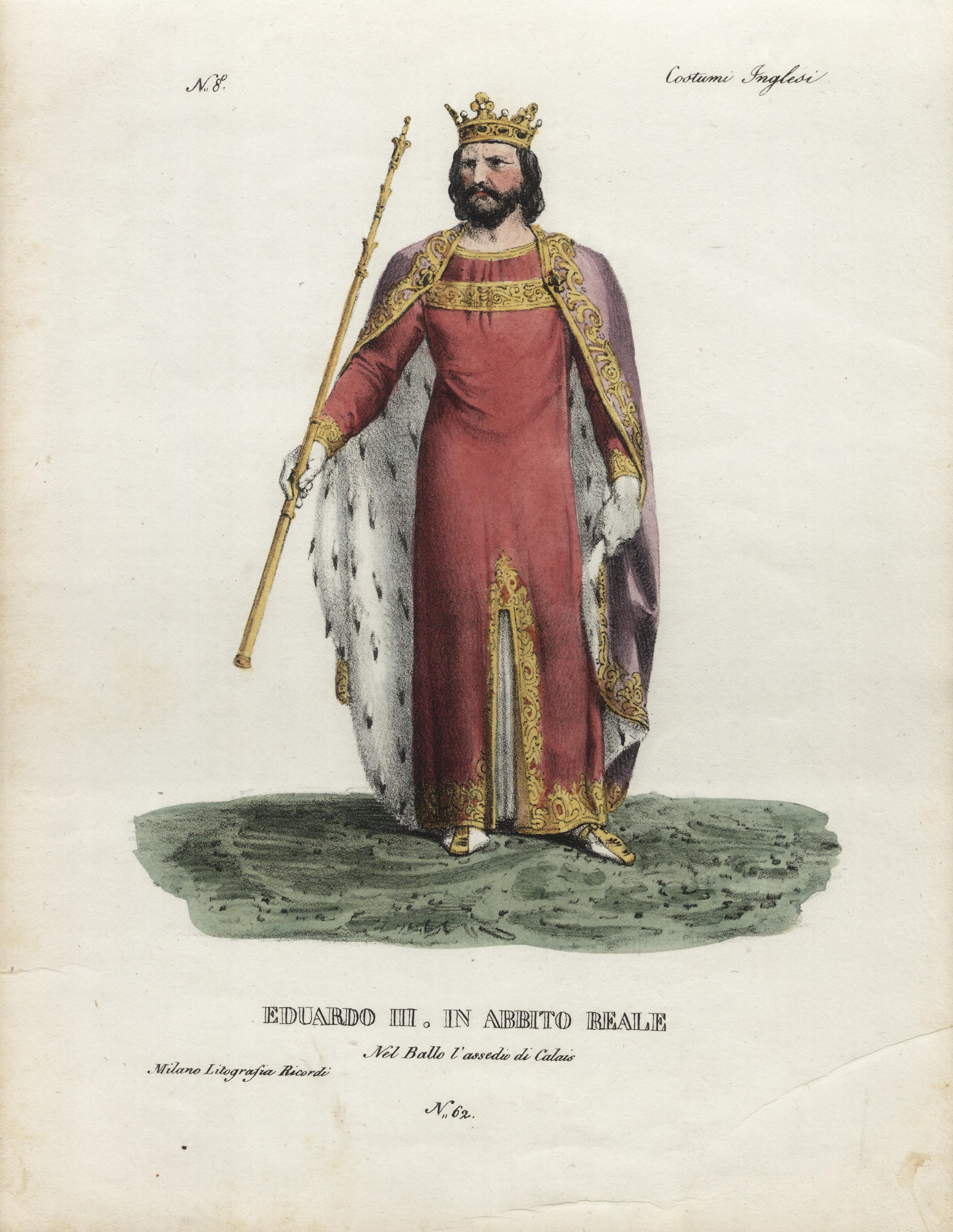 Edoardo III in abito regale, litografia